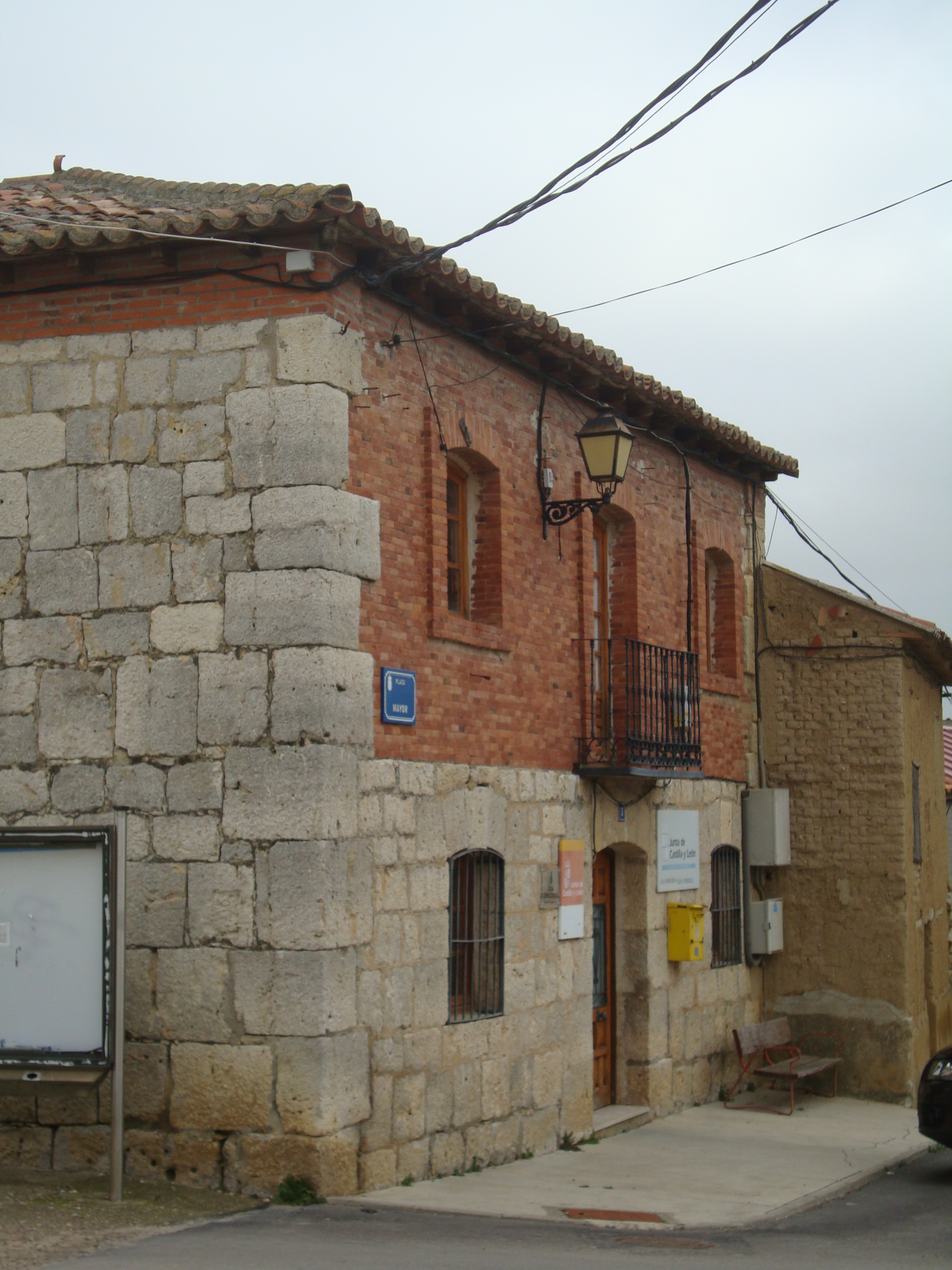 Casa consistorial y antiguas escuelas de Villán de Tordesillas (Valladolid).